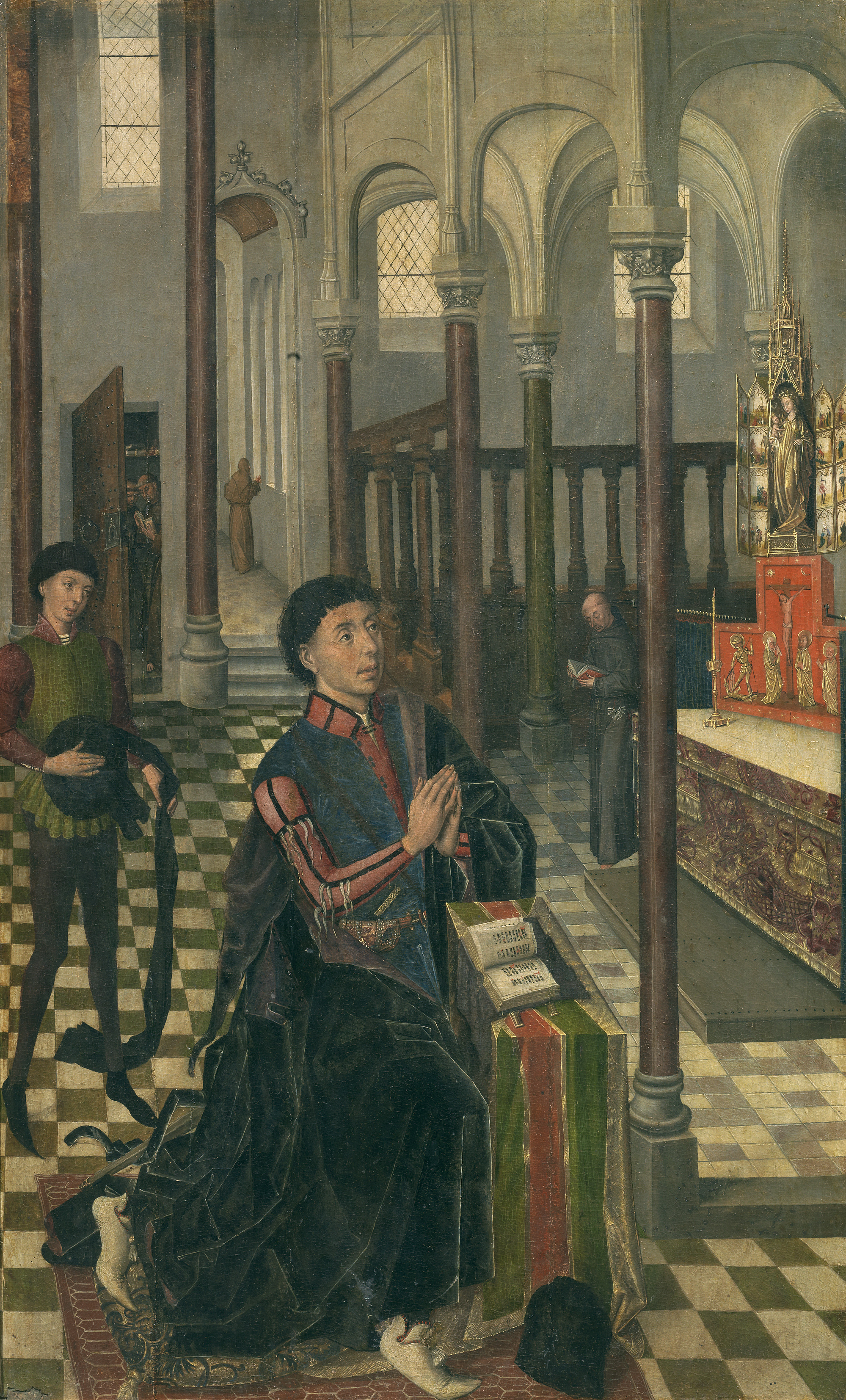 Retrato del aristócrata español Diego Hurtado de Mendoza (1417-1479), primer duque del Infantado y II marqués de Santillana.